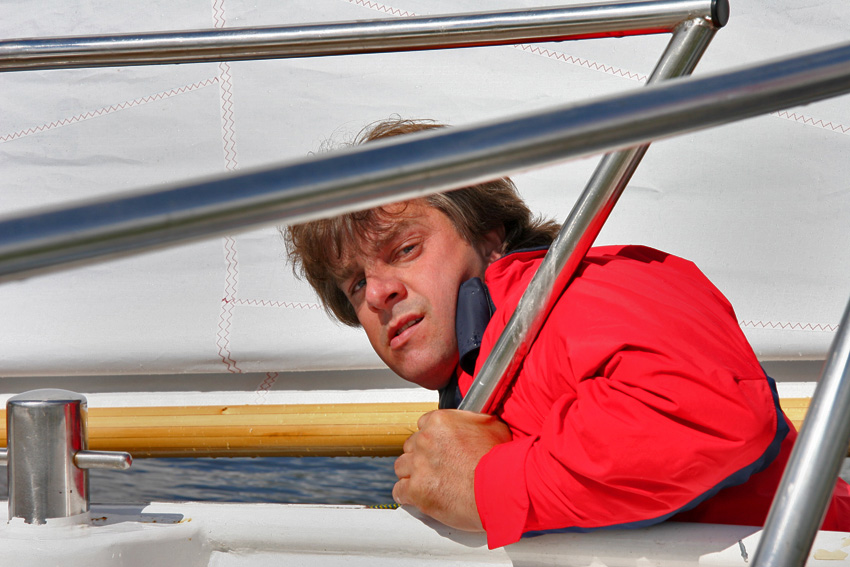 Gerhardus Johannes Cornelis (Gerhard) Potma (Sneek, 29 augustus 1967 - Sneek, 31 maart 2006) was een Nederlandse zeiler.